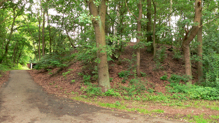 Sanddüne bei Drakenburg im Ortsteil Sandberge nahe der Fußgänger-Eisenbahnunterführung